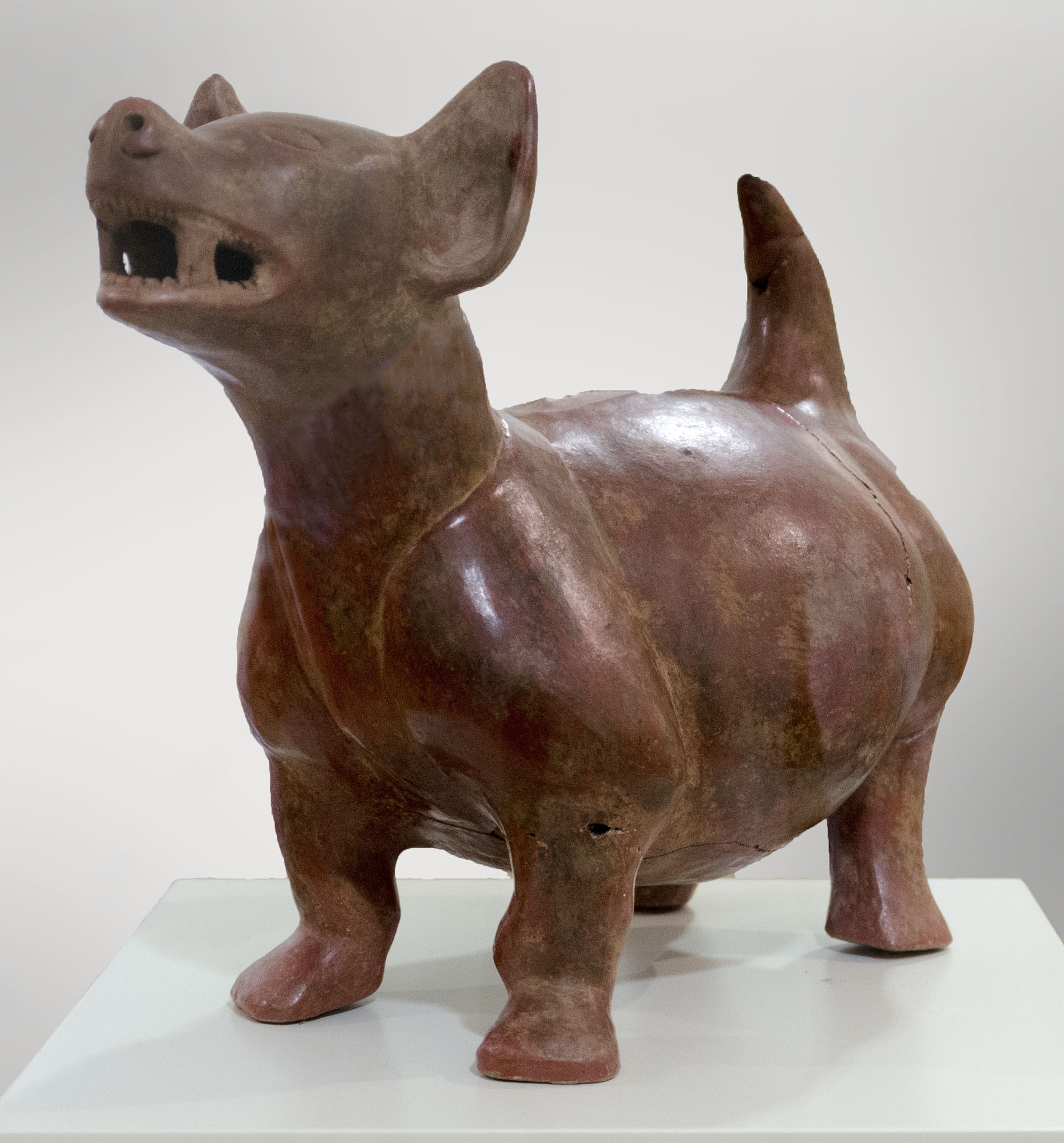 Esta raza de perros, original de México, acompañaba a los difuntos en su viaje al inframundo según la mitología mexica. Cerámica estilo Colima del Preclásico tardío (400 a.C. a 200 d.C.)